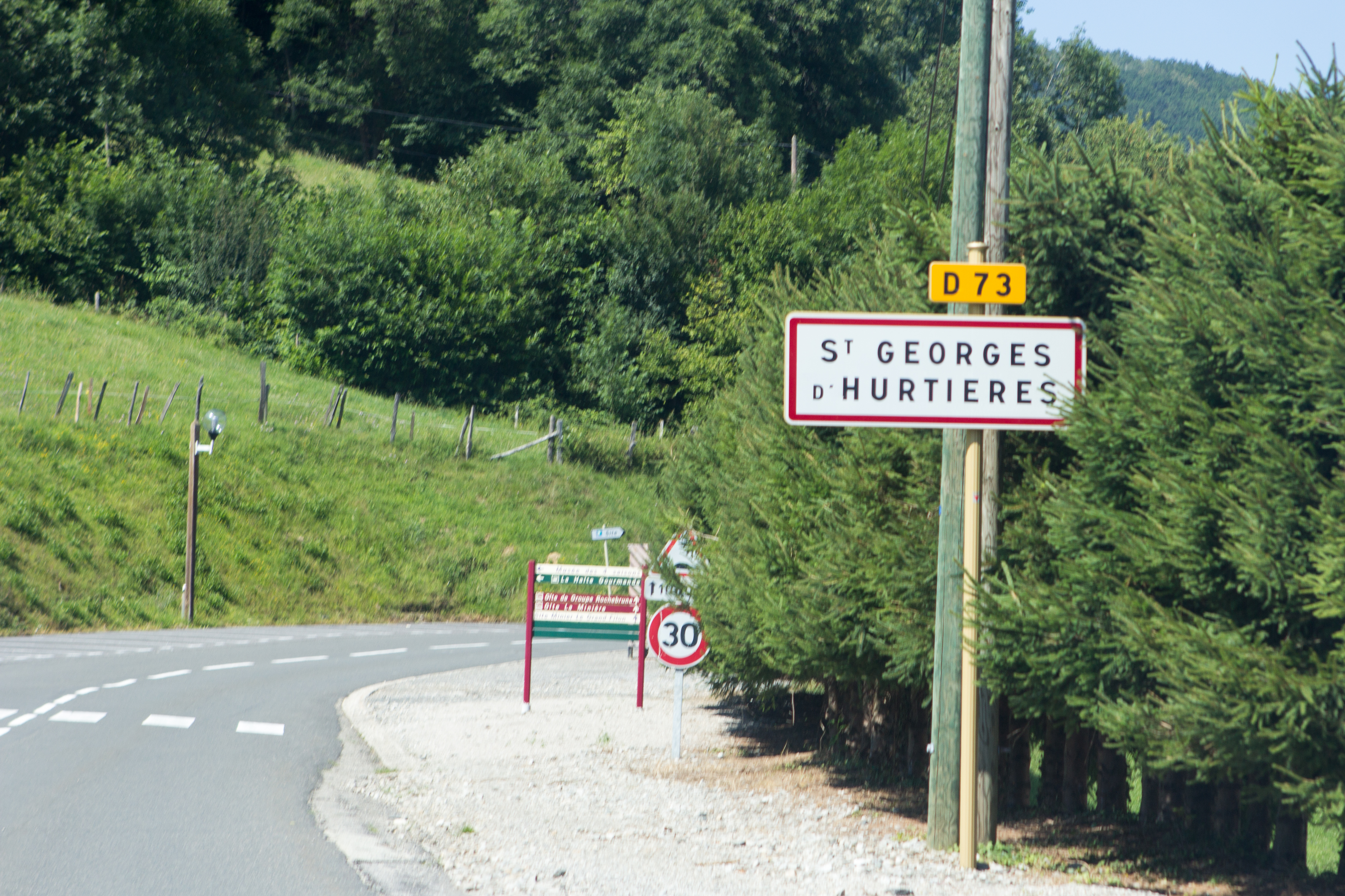 Vues de Saint-Georges d'Huretières / Saint-Georges d'Huretières, Savoie, France